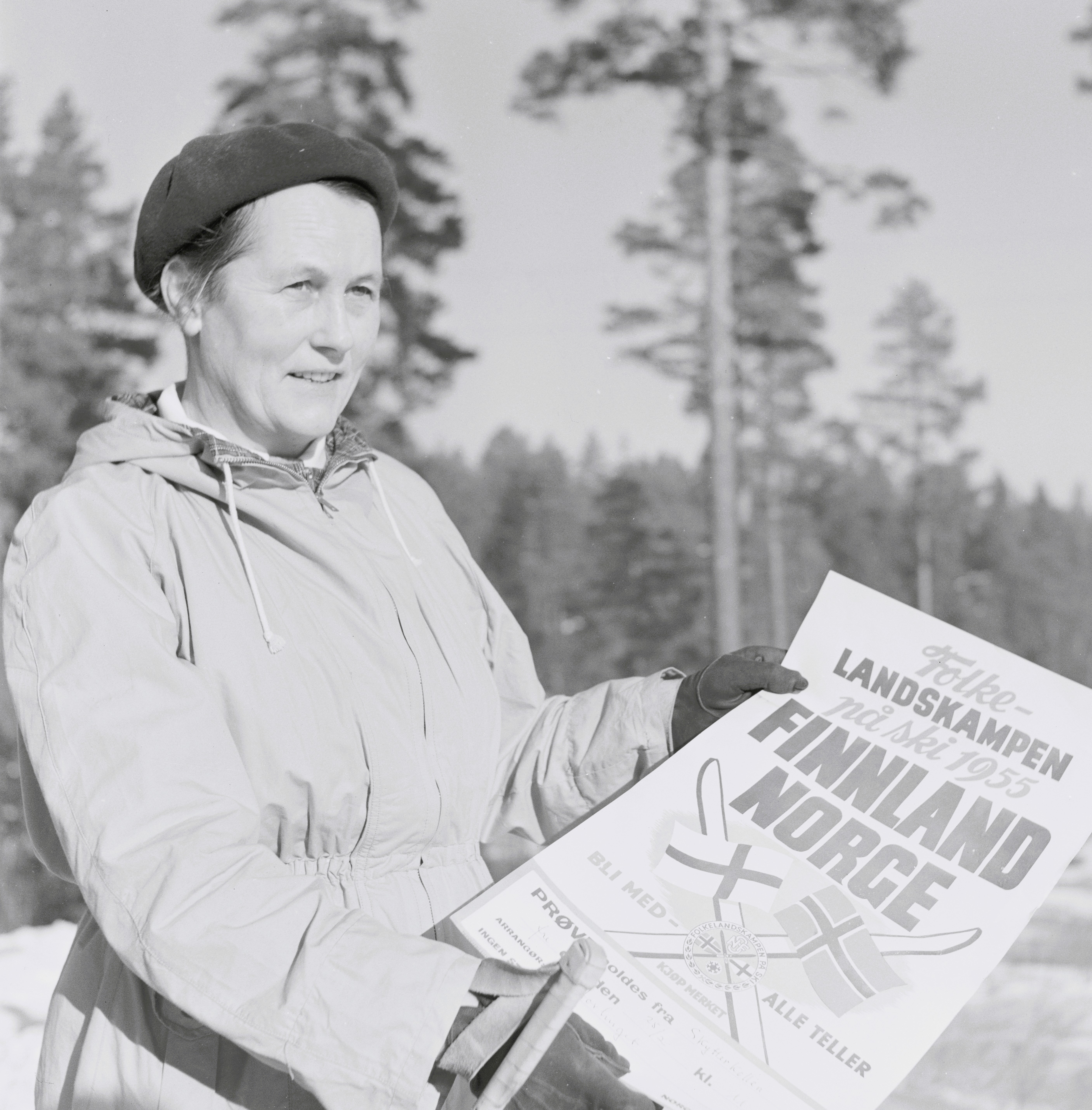 Bildet er hentet fra Arkivverket. Stortinget på ski NÅ nr. 9, 1955 Arkivinstitusjon : Riksarkivet Arkivnavn : Billedbladet NÅ Sted : Norge, Ukjent, Ukjent, Ukjent Emneord: Snø, Vinter, Ski, Kvinner Avbildet: Magnhild Hagelia